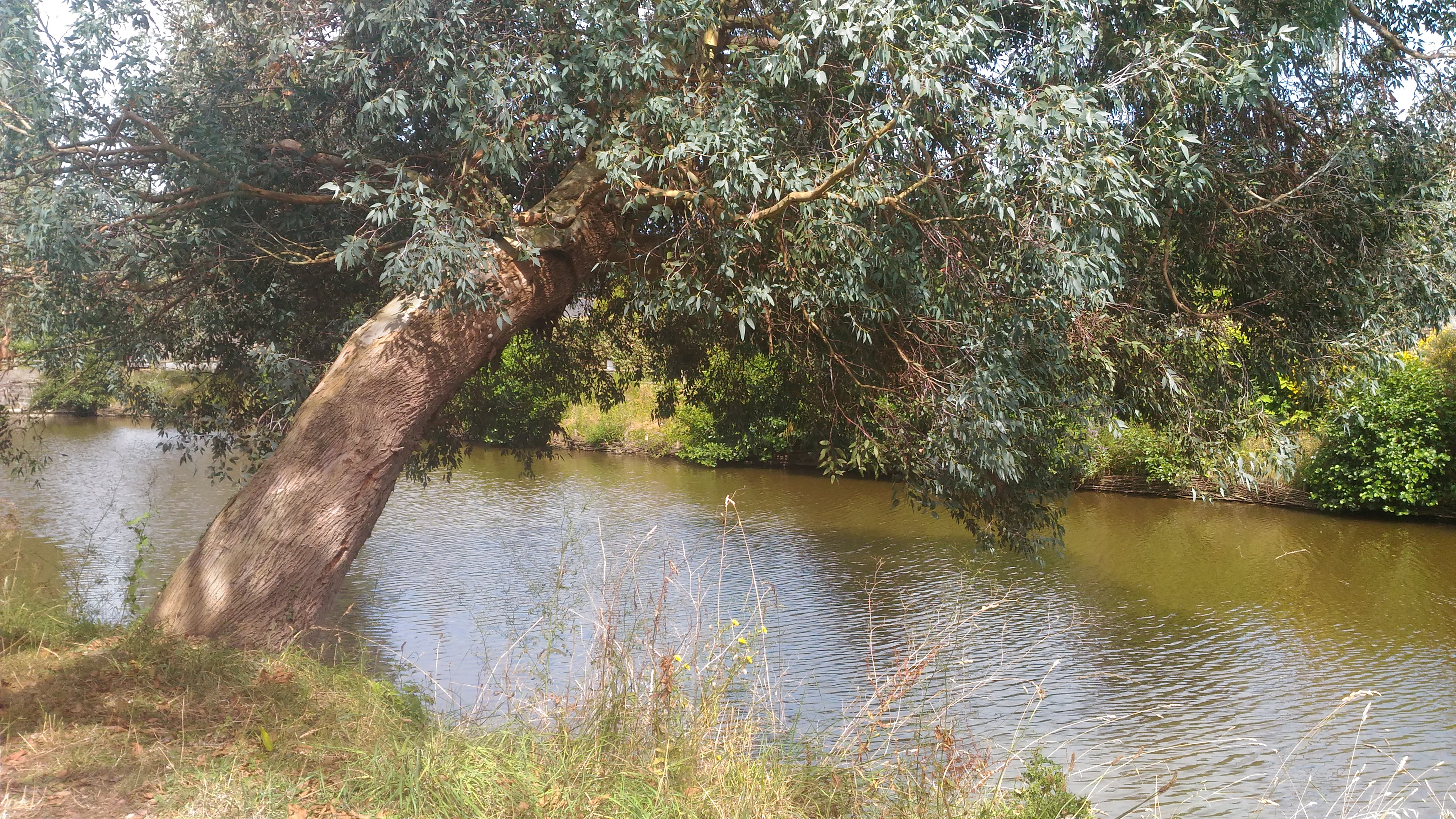 Rivière du Crèvelin